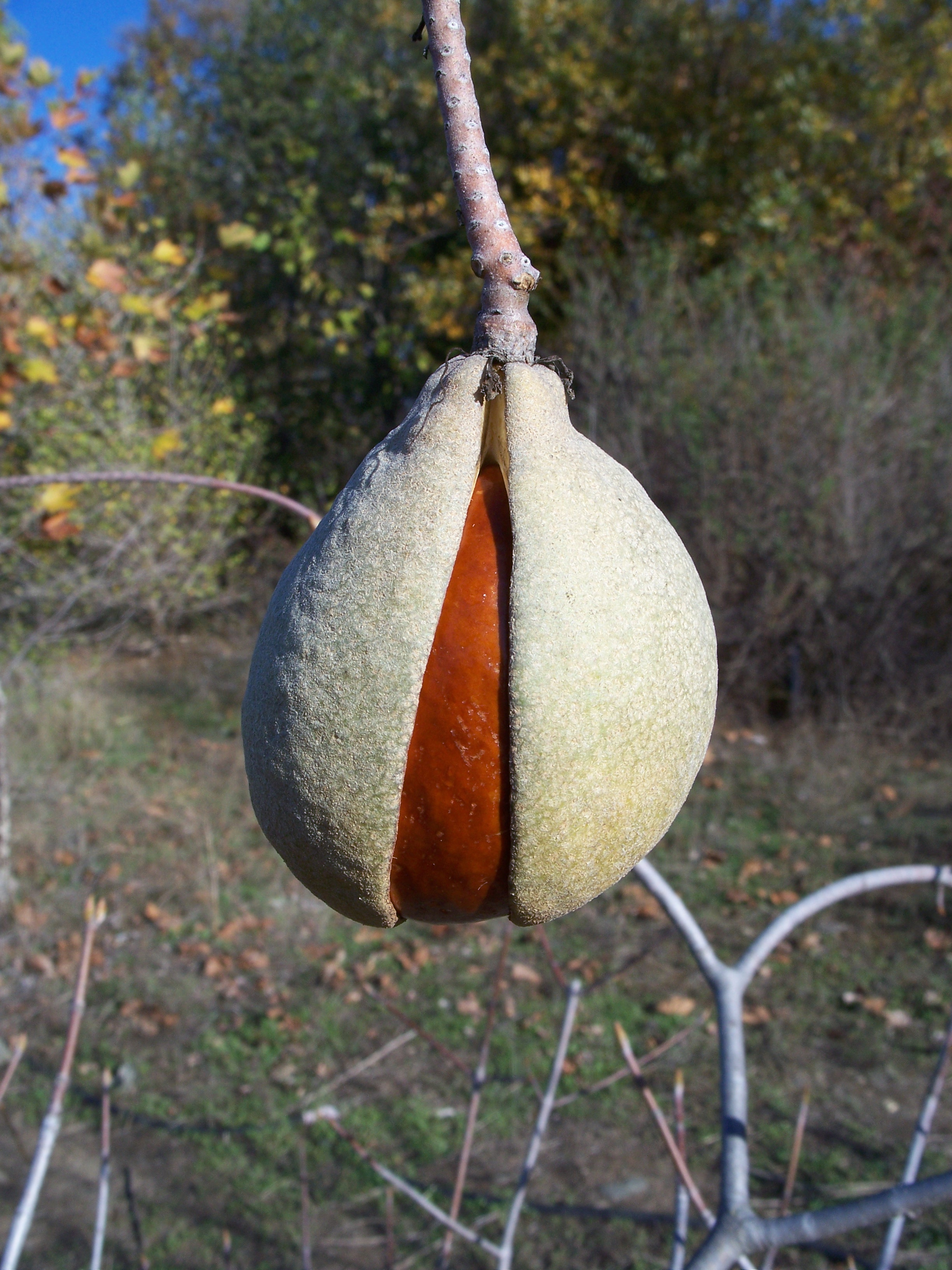 Aesculus californica Made in San Jose, California. Identified by Franz Xaver.